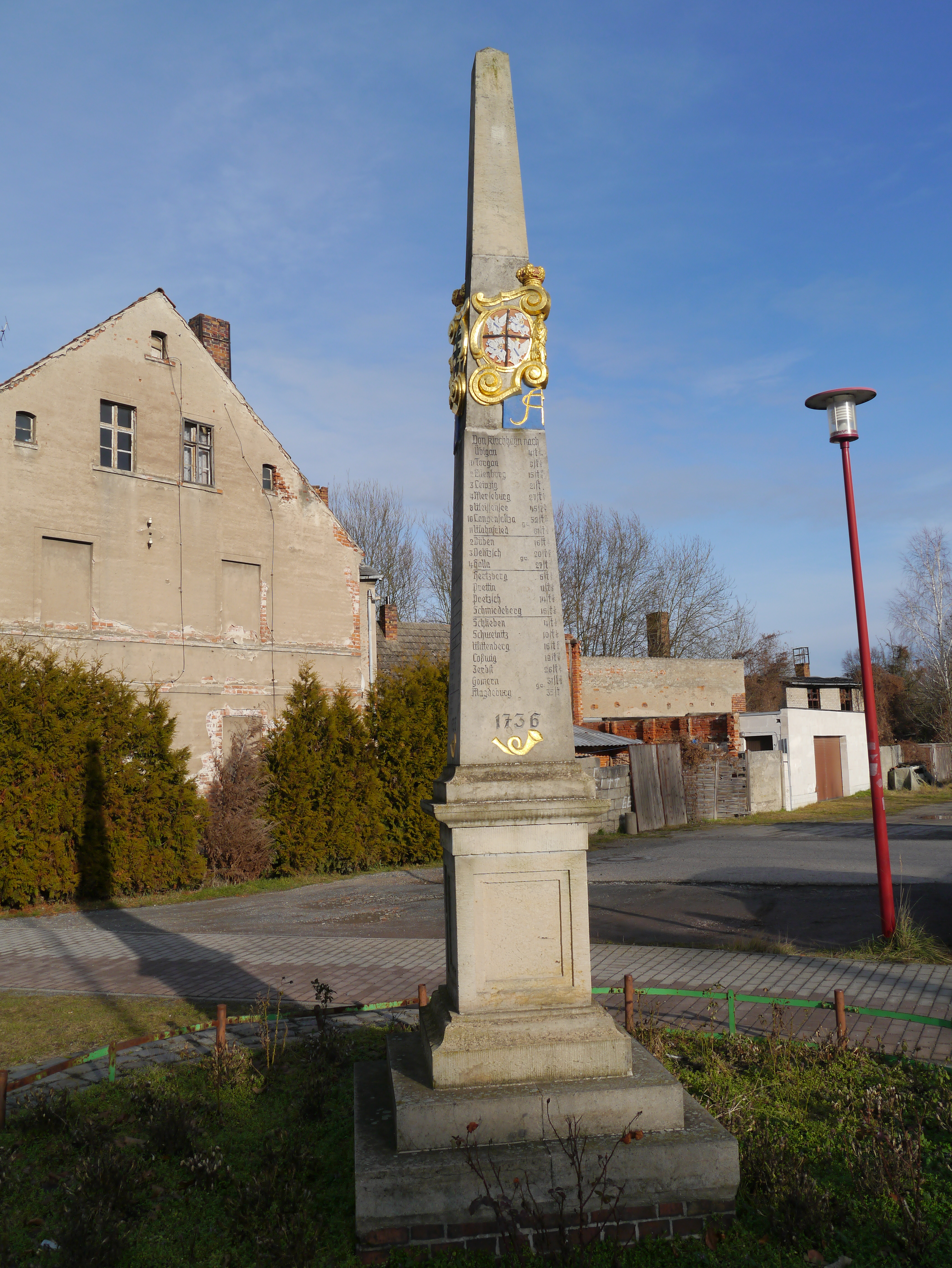 Kursächsische Postmeilensäule von 1736 in Doberlug-Kirchhain; aufgestellt auf dem Marktplatz, durch Errichtung Denkmal zum Deutsch-Franz. Krieg 1870/71 seit 1887 auf dem Schützenplatz Ortsteil Kirchhain. Mehrfach restauriert und instandgesetzt.